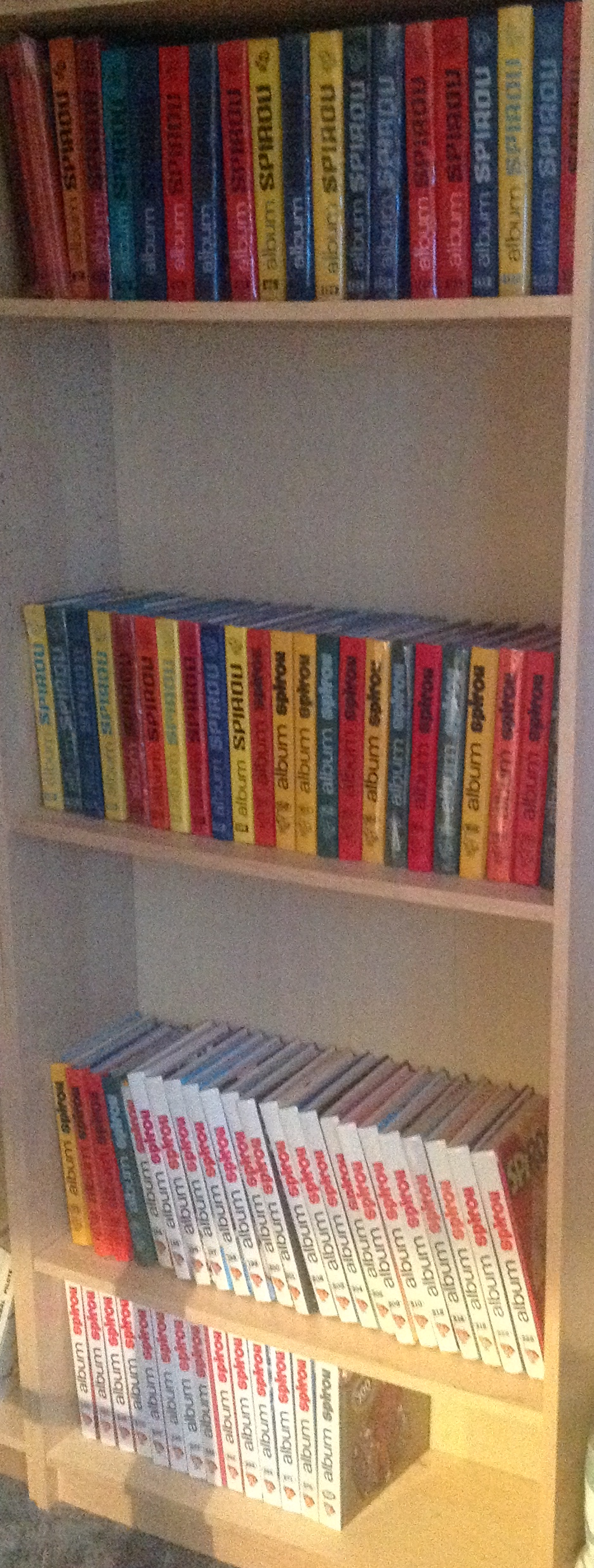 Bibliothèque de recueil du journal Spirou d'époques différentes.